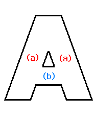 지름길에 대한 설명